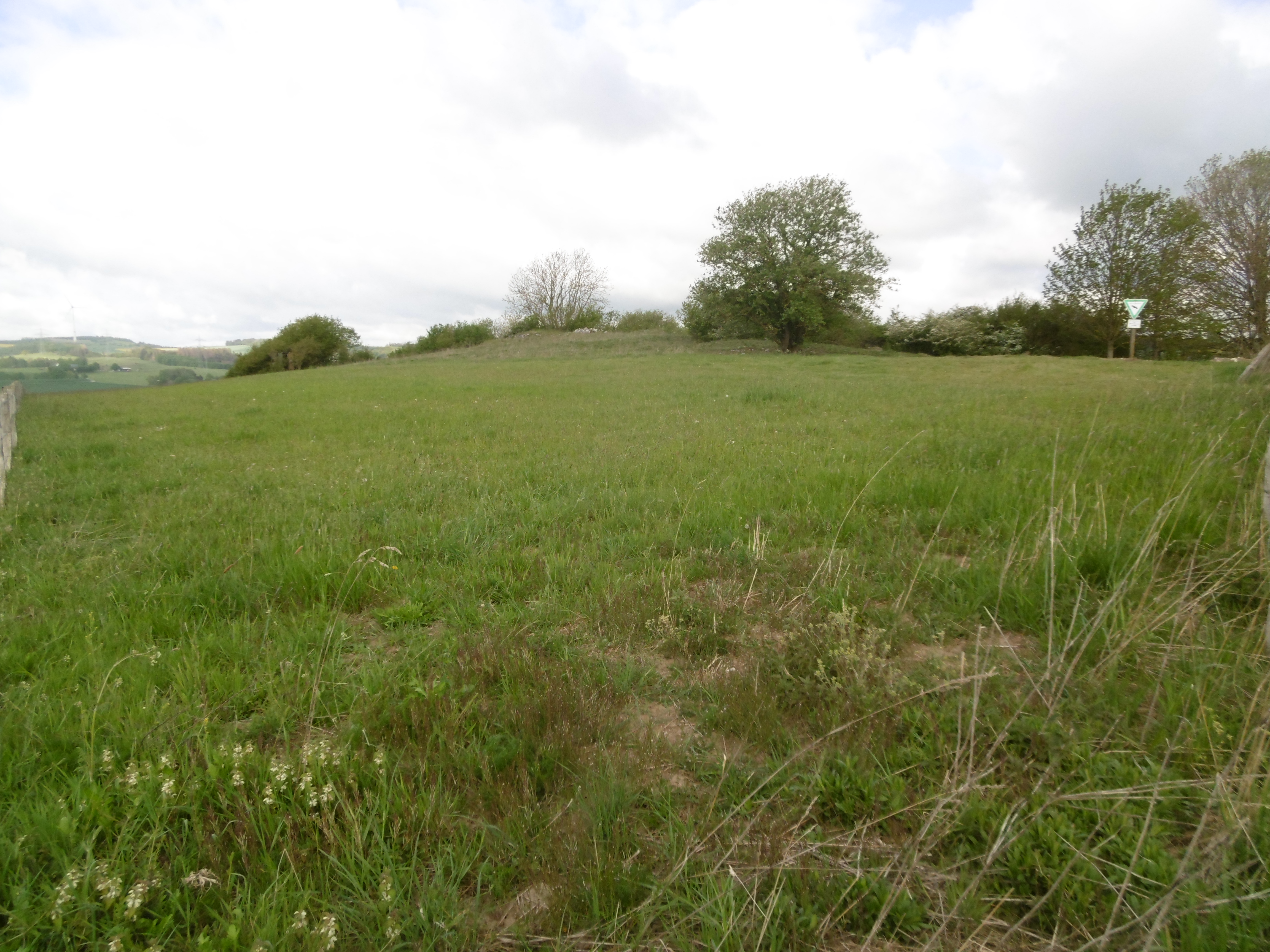 Naturschutzgebiet Hermelenstein​ vom Südostrand.